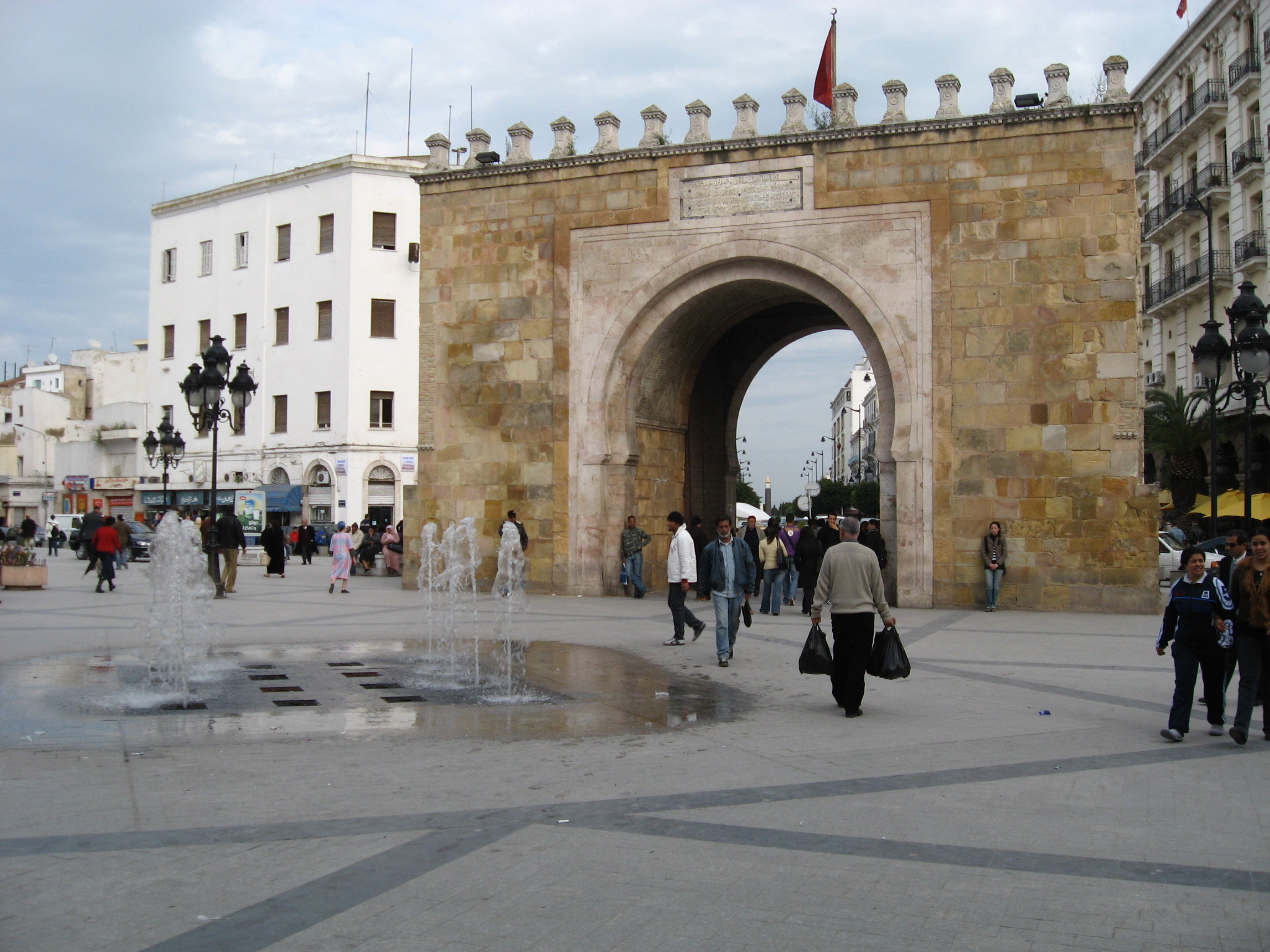 Port de France